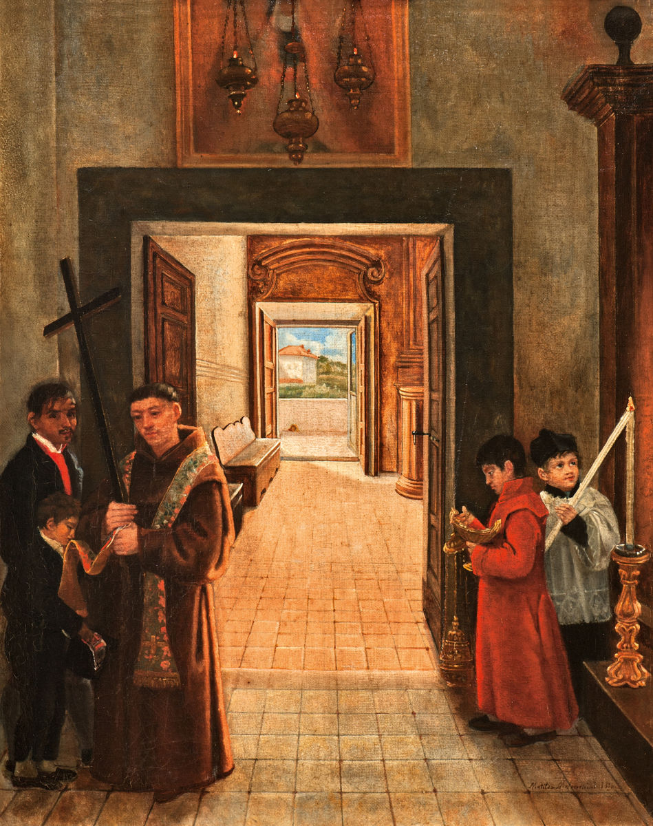 «Klostergang». Öl auf Leinwand. Signiert, 1819 datiert. 47 x 36,8 cm. Chiostro, olio su tela firmato e datato